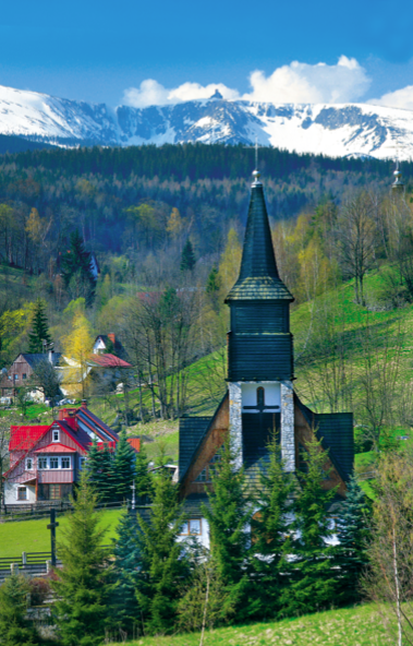 .Divine Mercy Church in Jagniątków